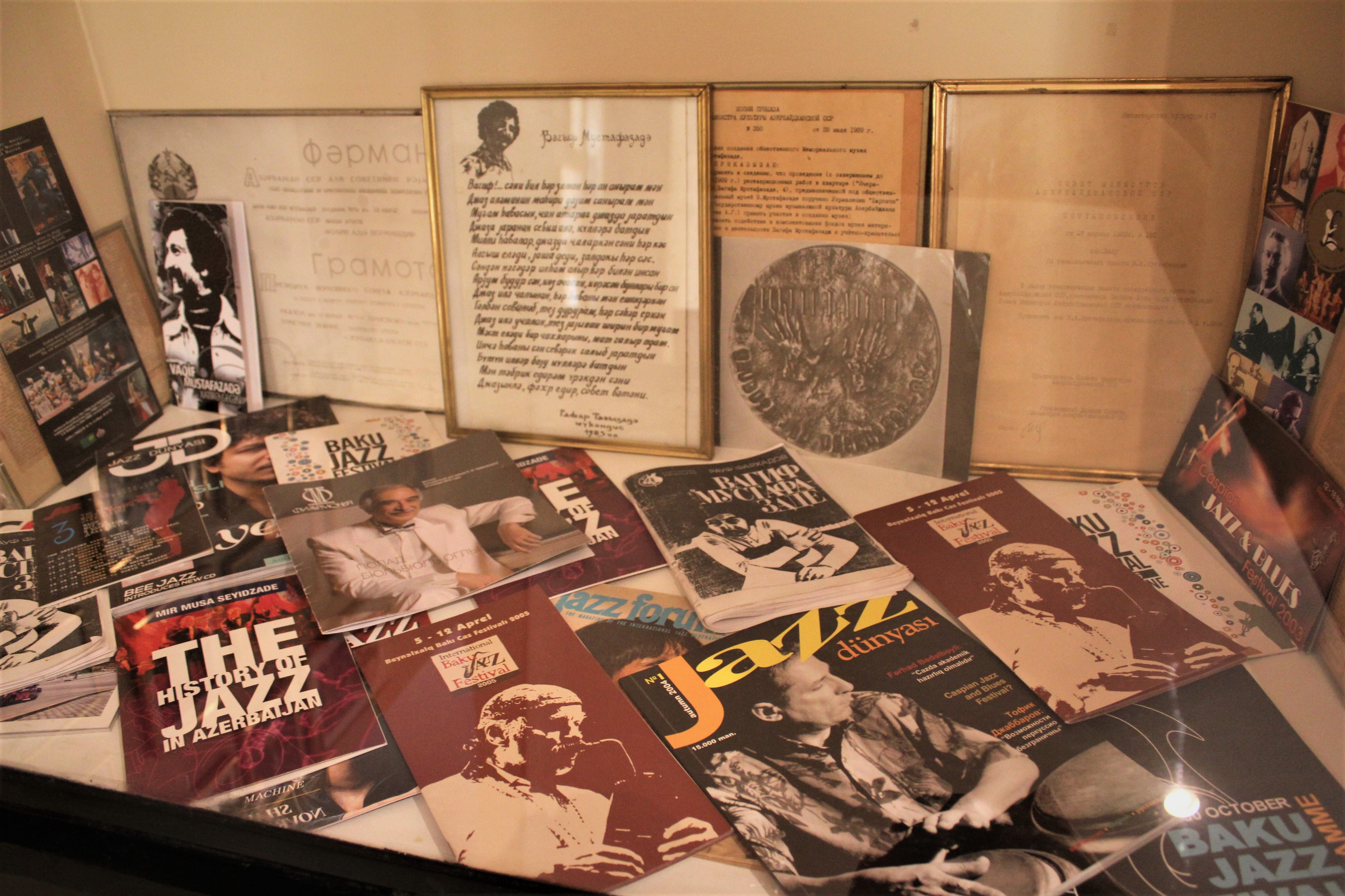 Экспонаты в доме-музее азербайджанского джазового композитора и пианиста Вагифа Мустафазаде.